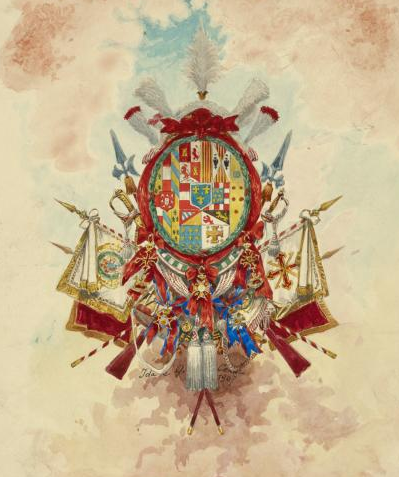 Quinto Cenni, 1907